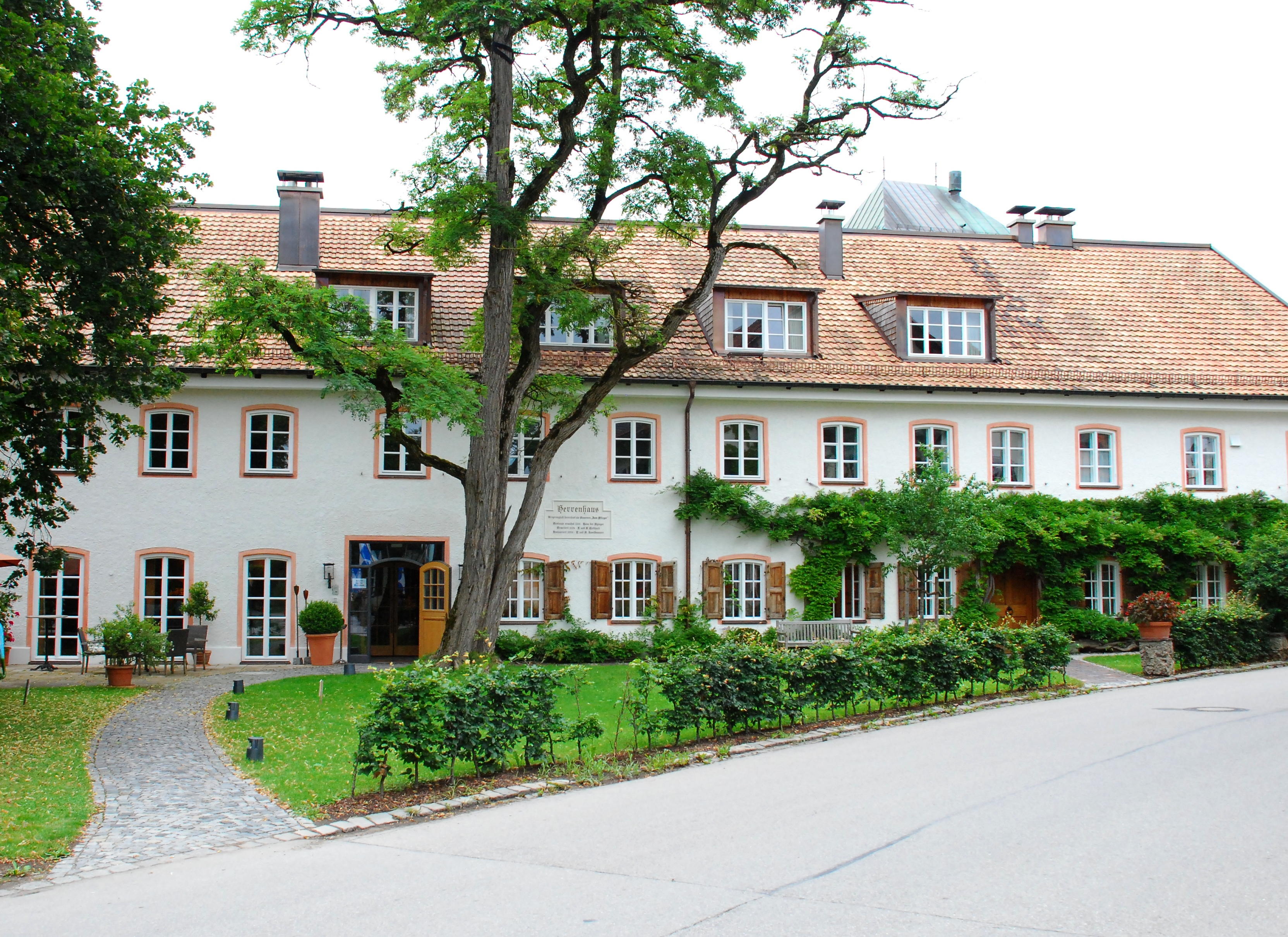 Ehemaliges land- und forstwirtschaftliches Anwesen "Zum Pfleger", dann Gastronomiegebäude in der Zornedinger Straße 2 in Aying, Landkreis München, Bezirk Oberbayern, Bayern. Als Baudenkmal in der Bayerischen Denkmalliste unter Aktennummer D-1-84-137-18 aufgeführt. Laut Denkmalliste bezeichnet mit dem Jahr 1847. Foto gemäß den Voraussetzungen zur Panoramafreiheit von öffentlicher Verkehrsfläche aus aufgenommen.